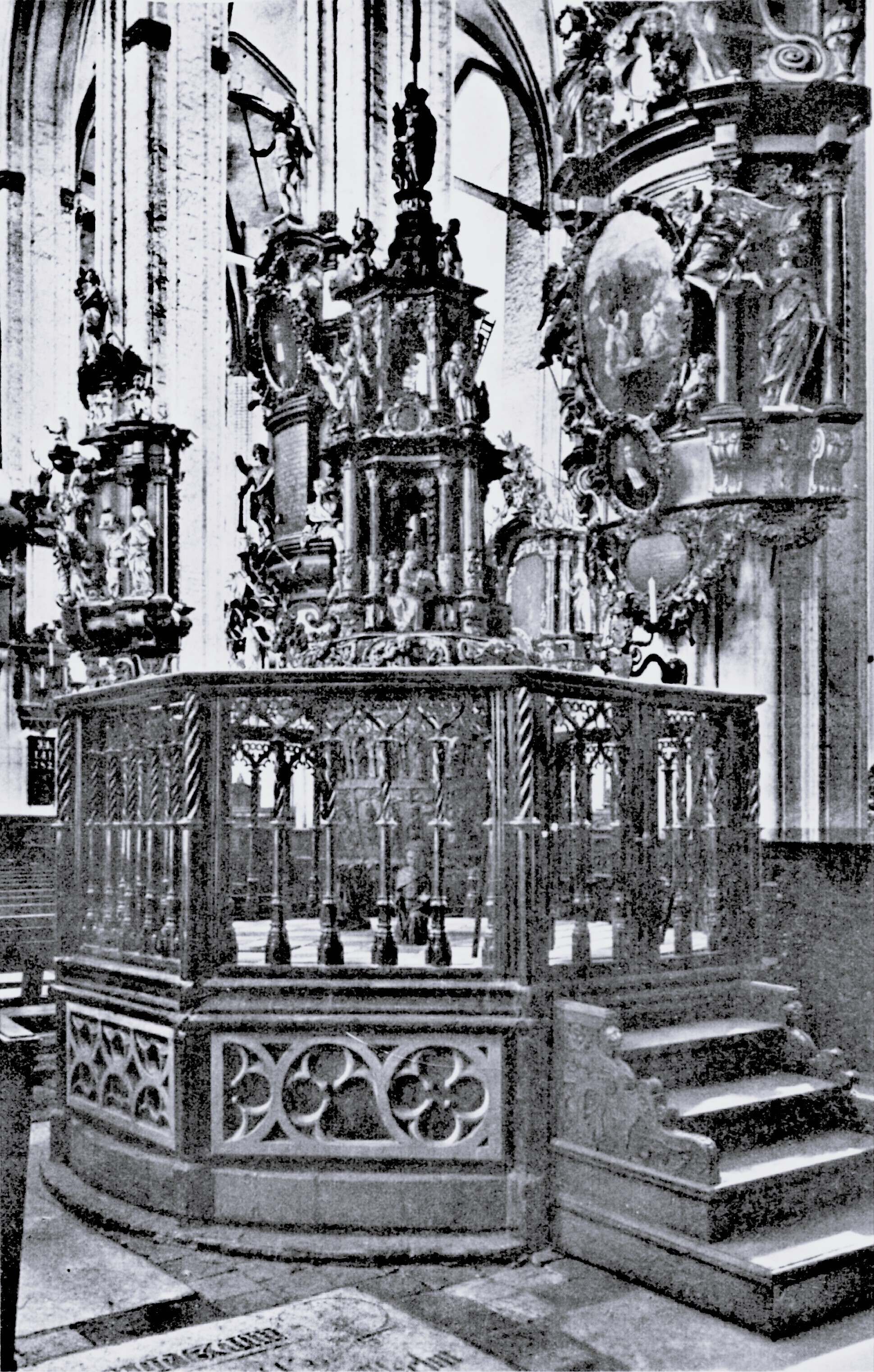 Die Taufe. Taufkessel 1337 von Hans Apengeter gegossen. Deckel von 1631. Messinggitter Anfang des 16. Jahrhunderts. Die Epitaphien an den Pfeilern aus der Zeit um 1700. Im 2. Weltkrieg zerstört.